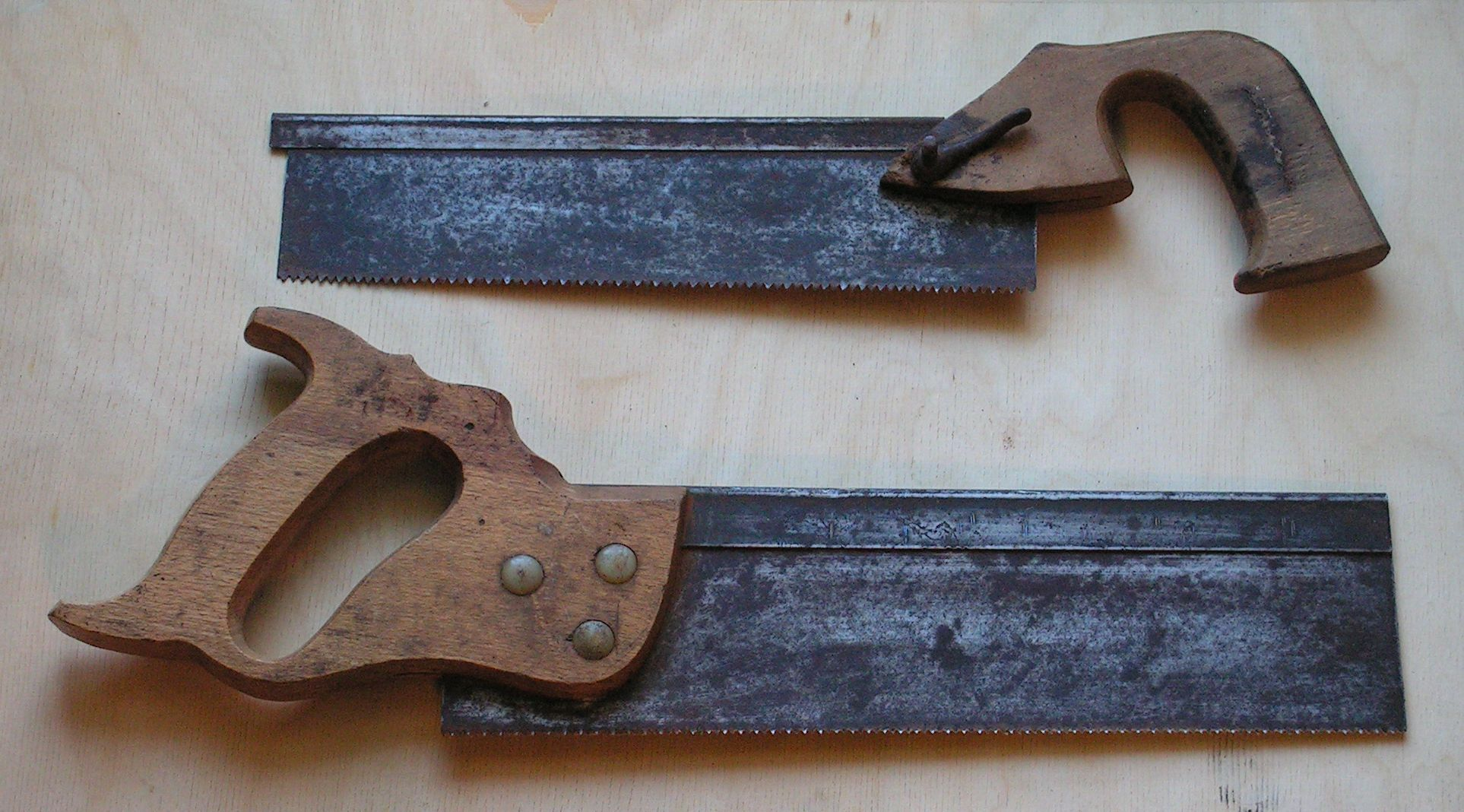 Piły jednouchwytowe - grzbietnice.